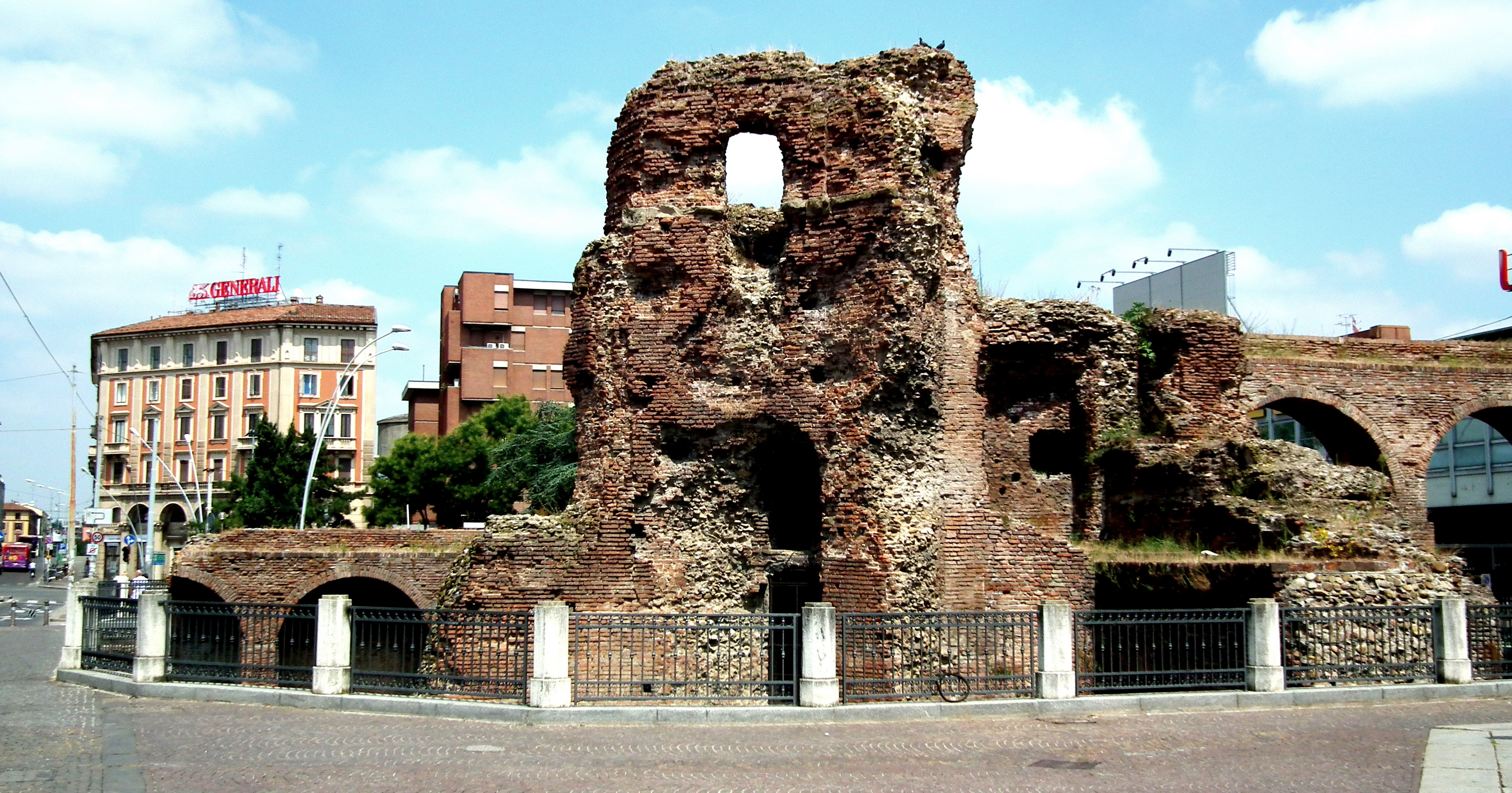 руины крепостных укреплений